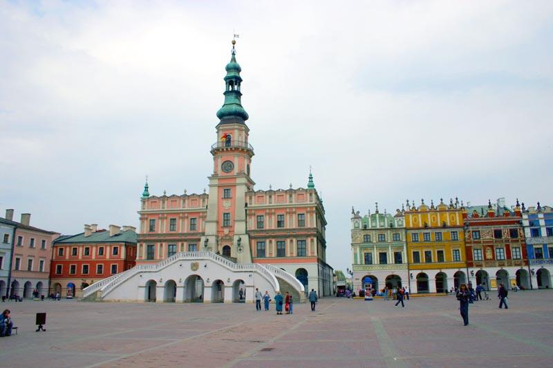 Zamosc (Poland)